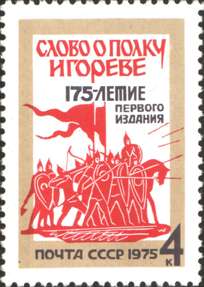 175-летие первого издания памятника древнерусской литературы конца XII века "Слово о полку Игореве". Художник: А. Калашников. Марка СССР 1975г., номинал - 4коп.